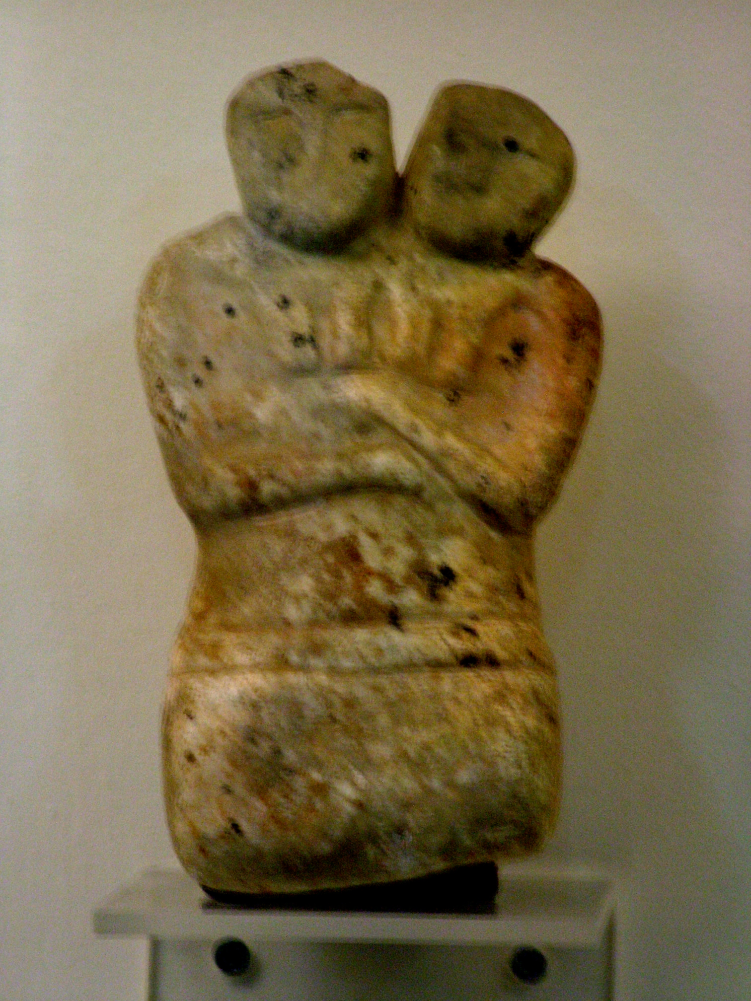 Catalhüyük, ikerszobor (Anatóliai Civilizációk Múzeuma, Ankara, Törökország)